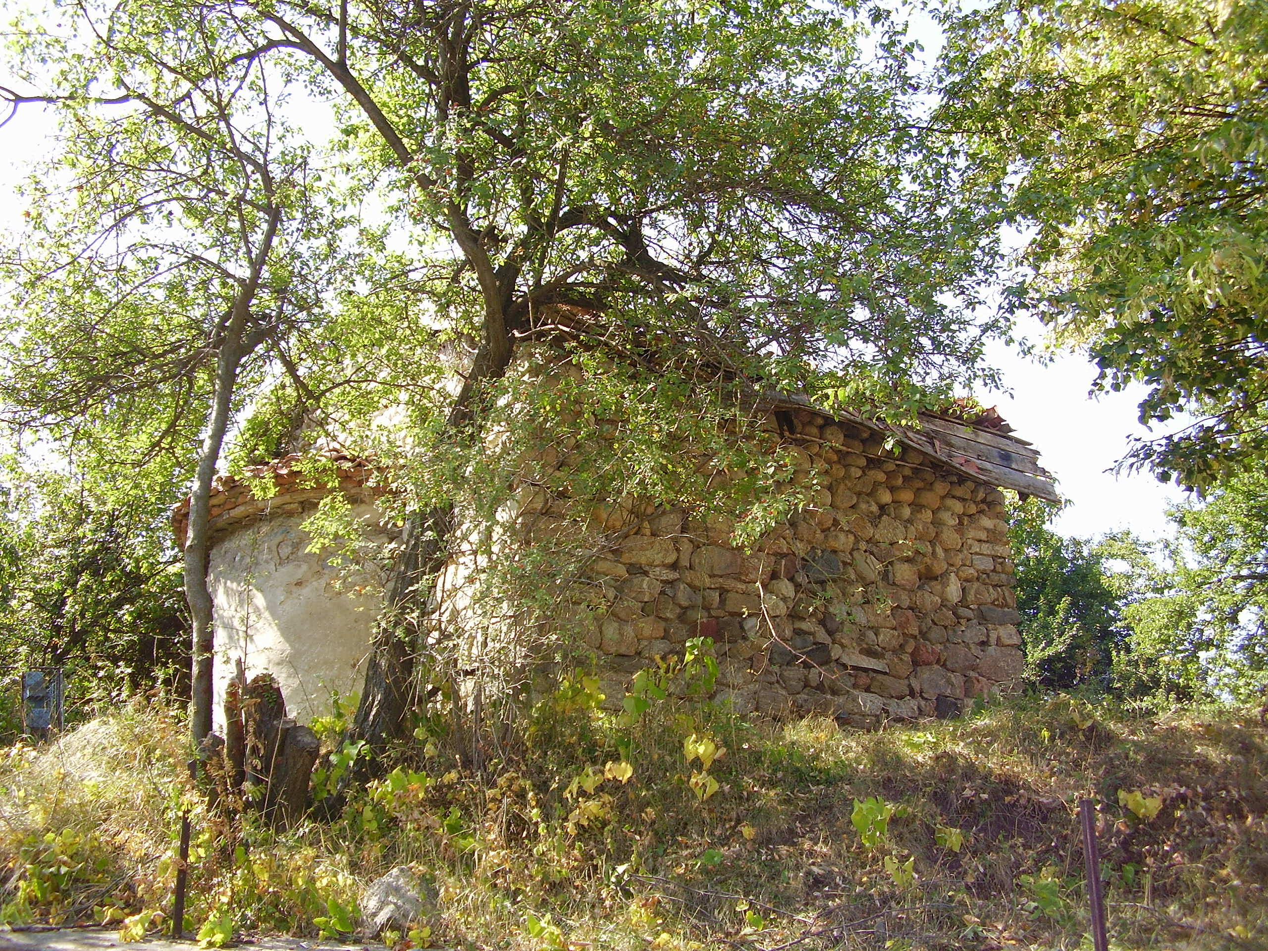 Средновековна църква "Свети Никола" - с.Сапарево, общ.Сапарева баня